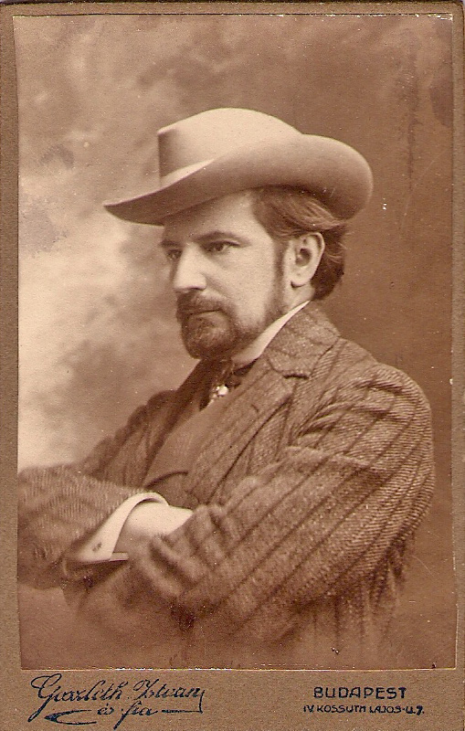 Portrait of Viktor Tardos Krenner